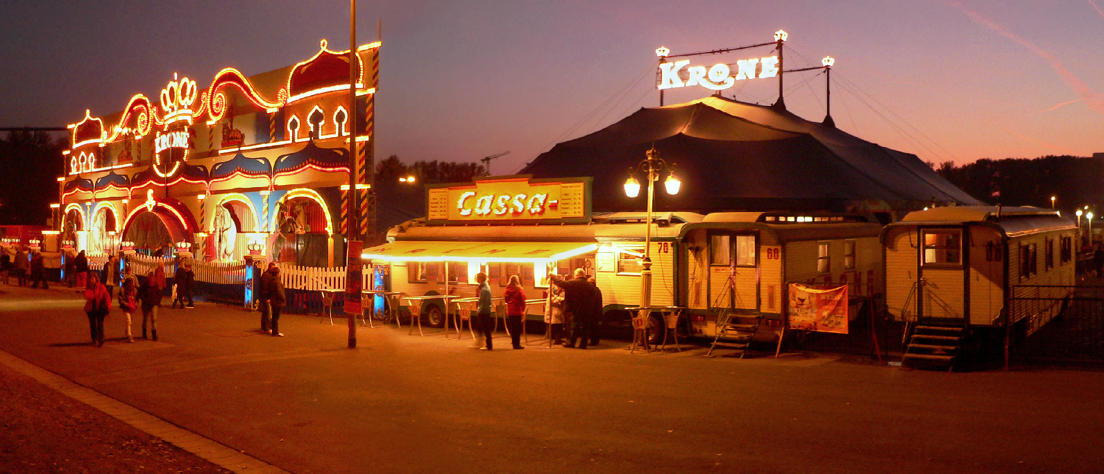 Circus Krone auf dem Schützenplatz Hannover